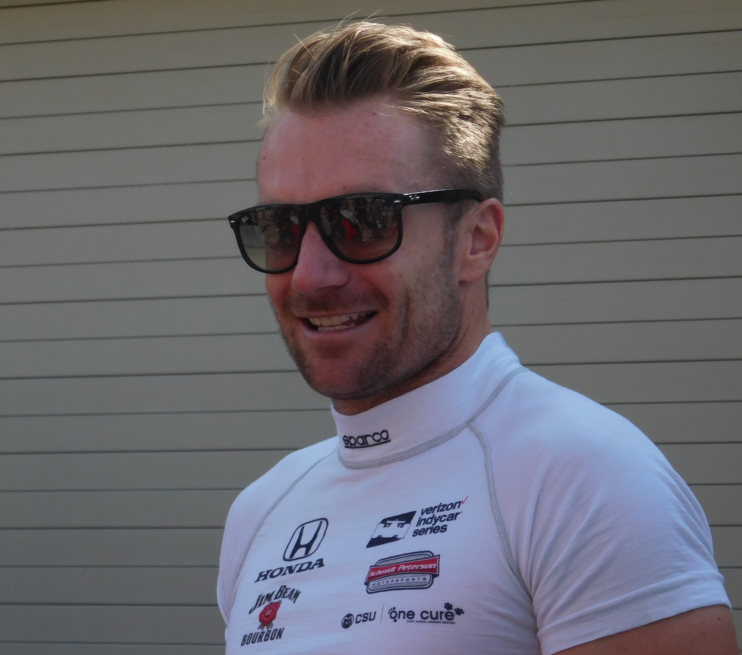 jay howard